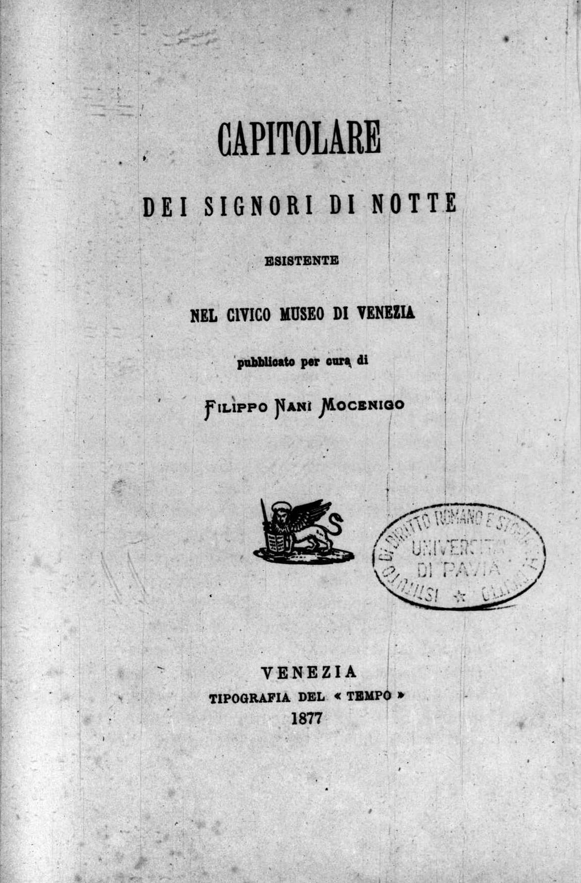 Frontespizio